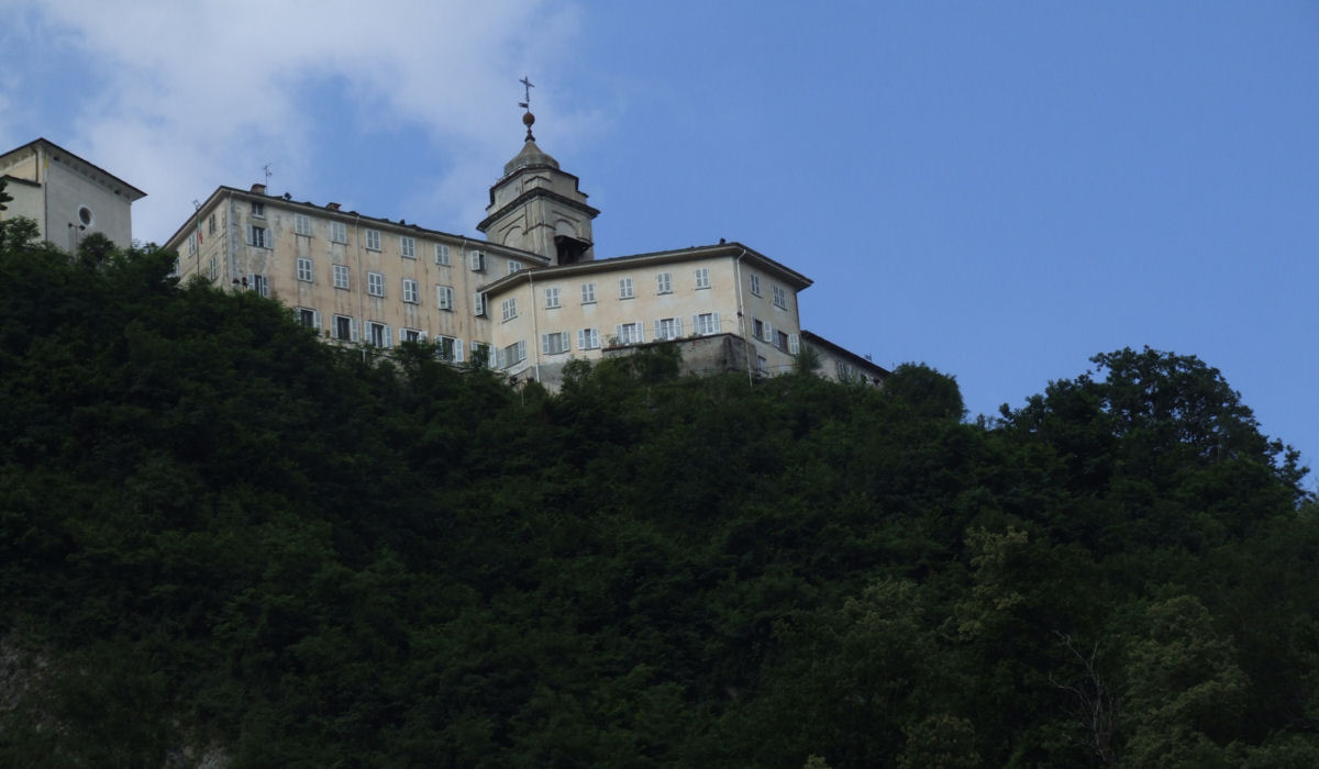 Sacro Monte di Varallo, Varallo Sesia, Italy